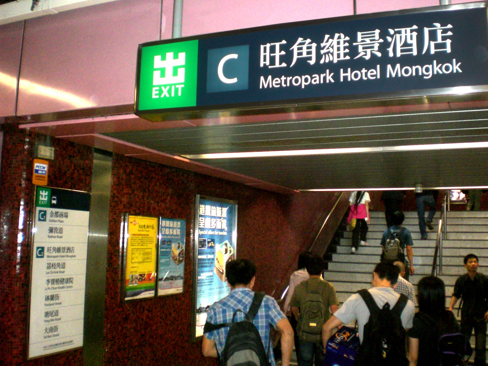 港鐵太子站